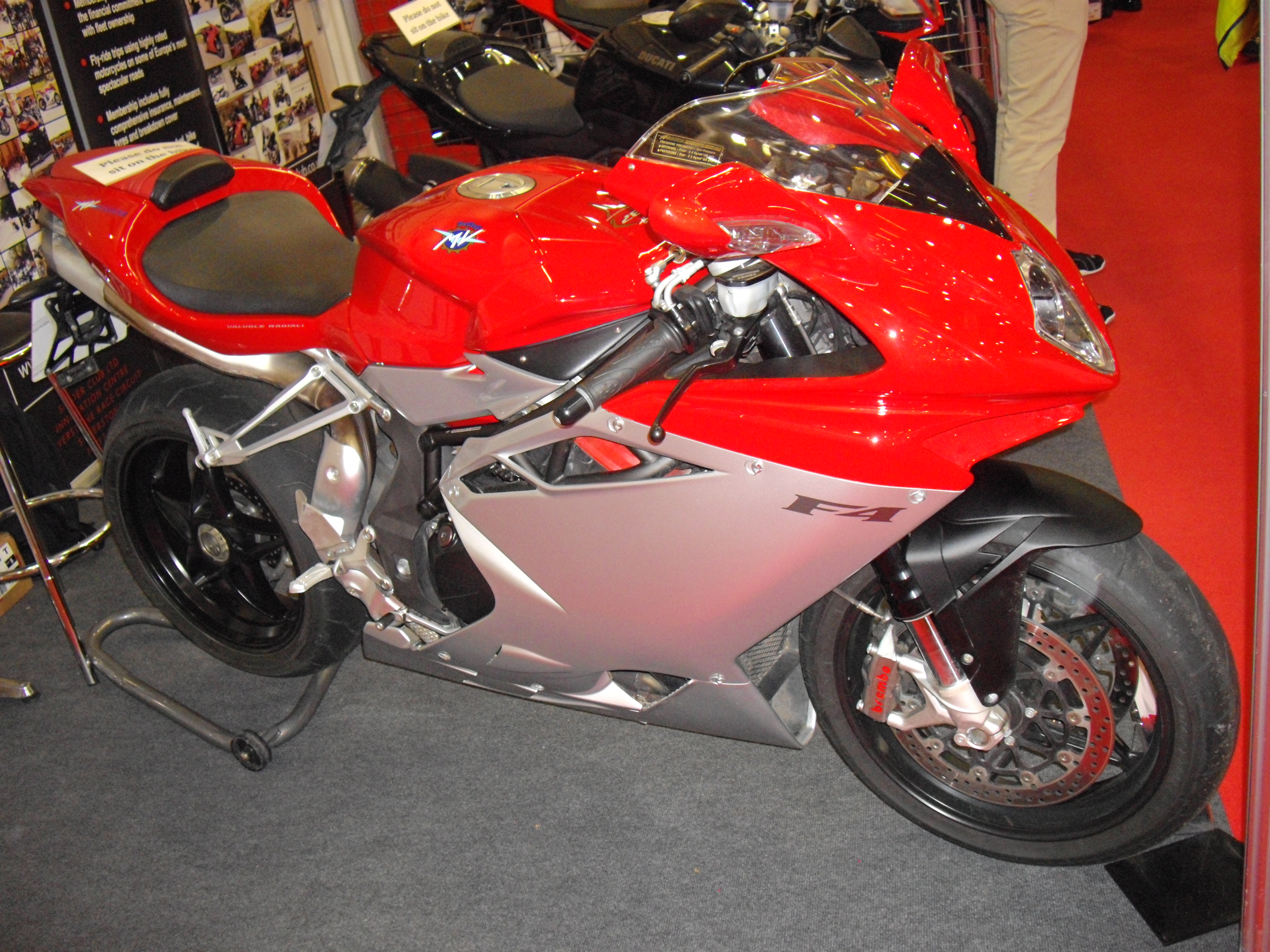 MV Agusta F4 1000